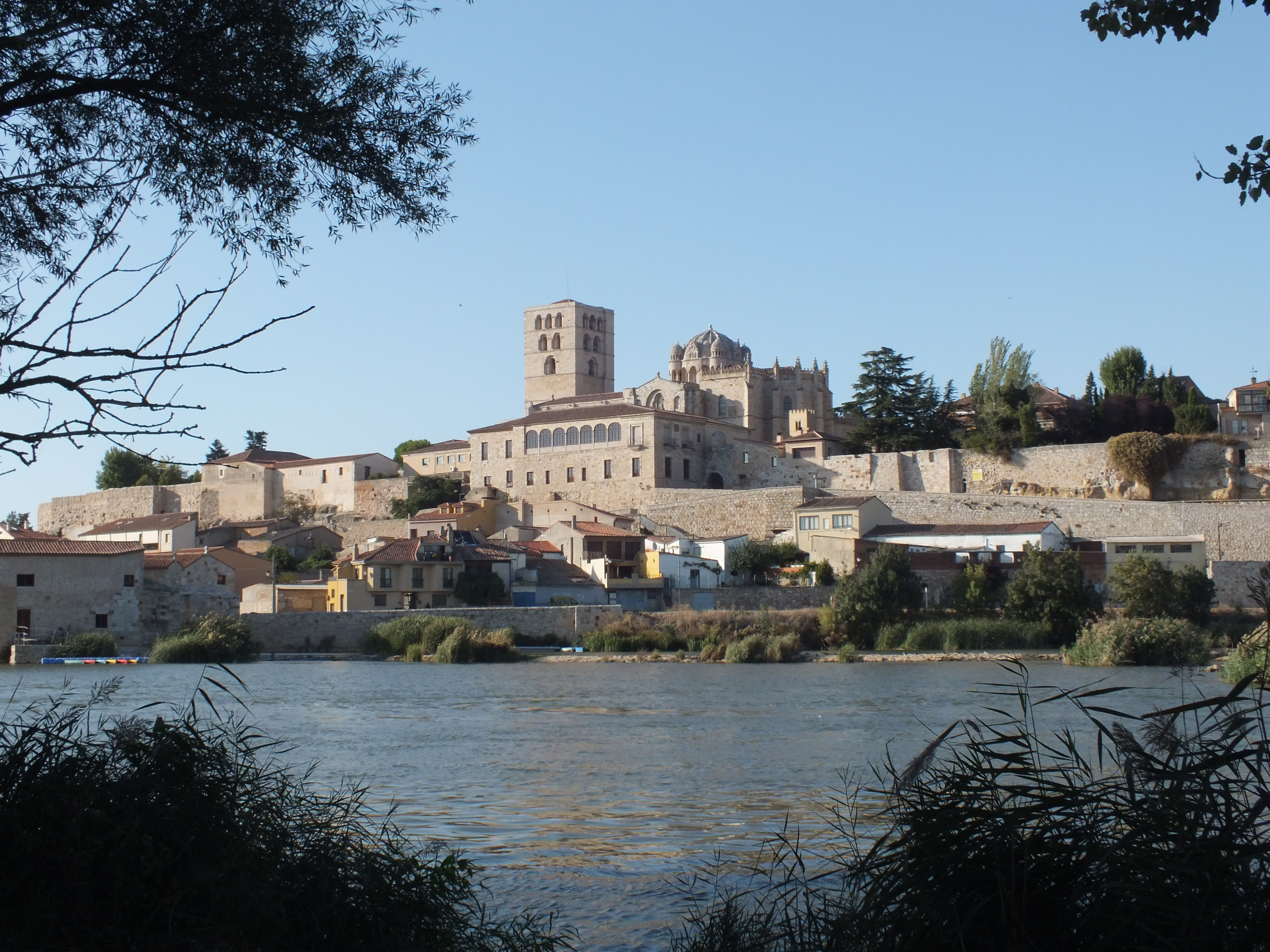 Vista de la catedral de Zamora desde la playa de los Pelambres